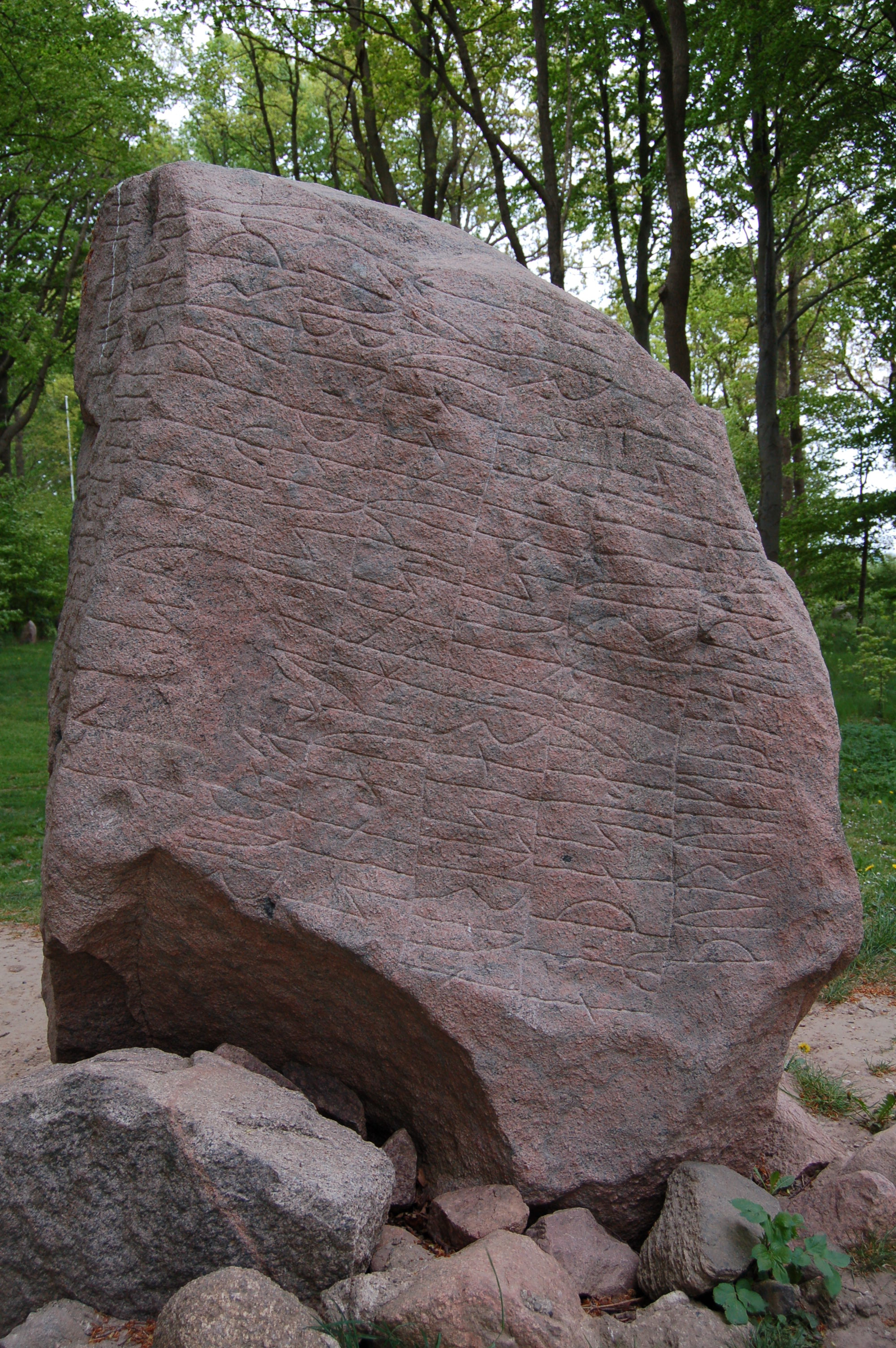 Photo of Glavendrup stone, runestone from Funen, Denmark